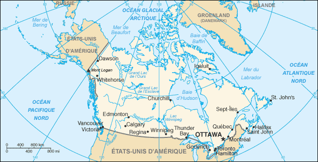 Carte du Canada Mapa de Canada Map in French of Canada